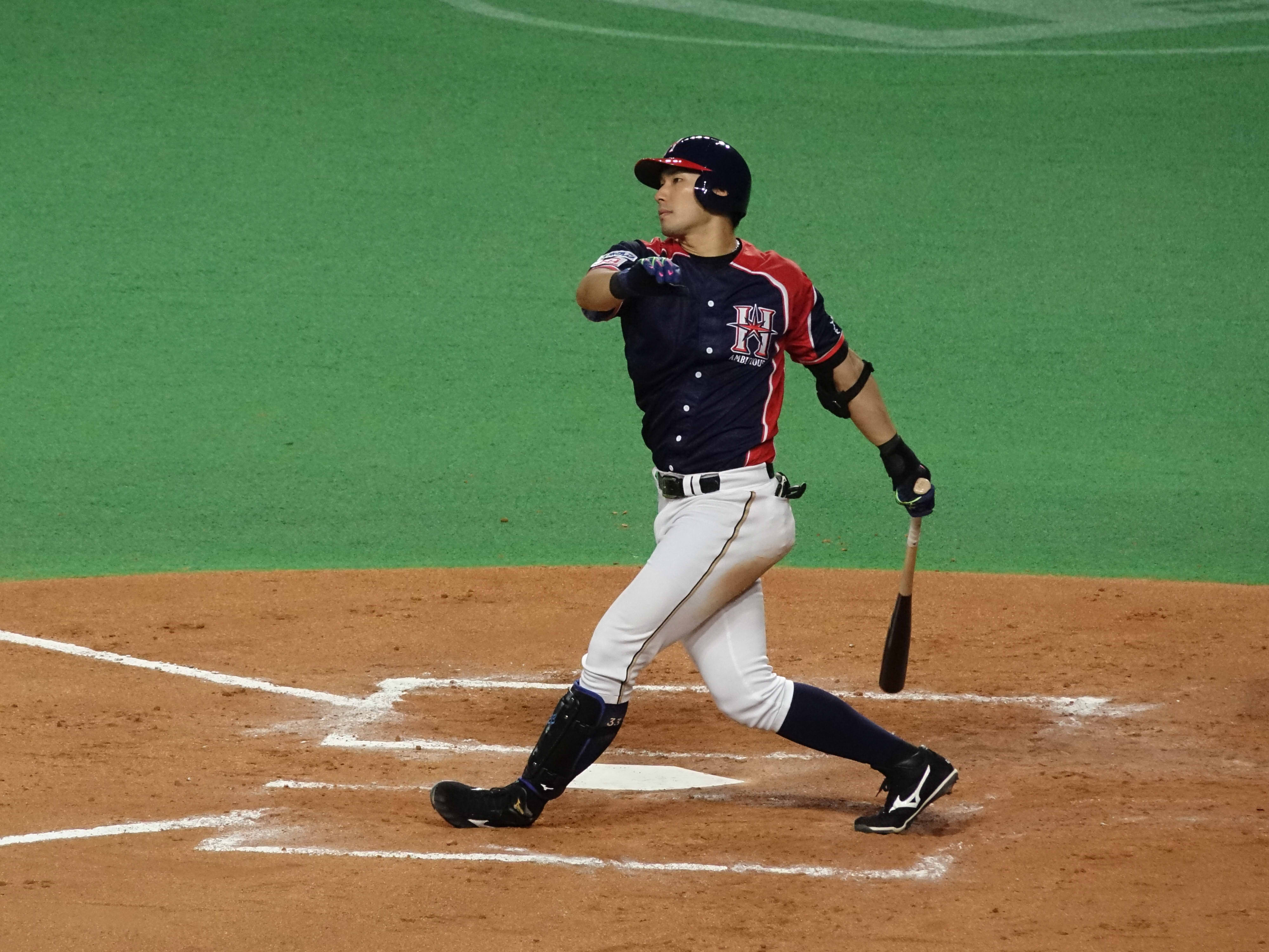 日本ハム時代の大田泰示